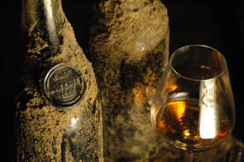 Vin de Jasnières AOC